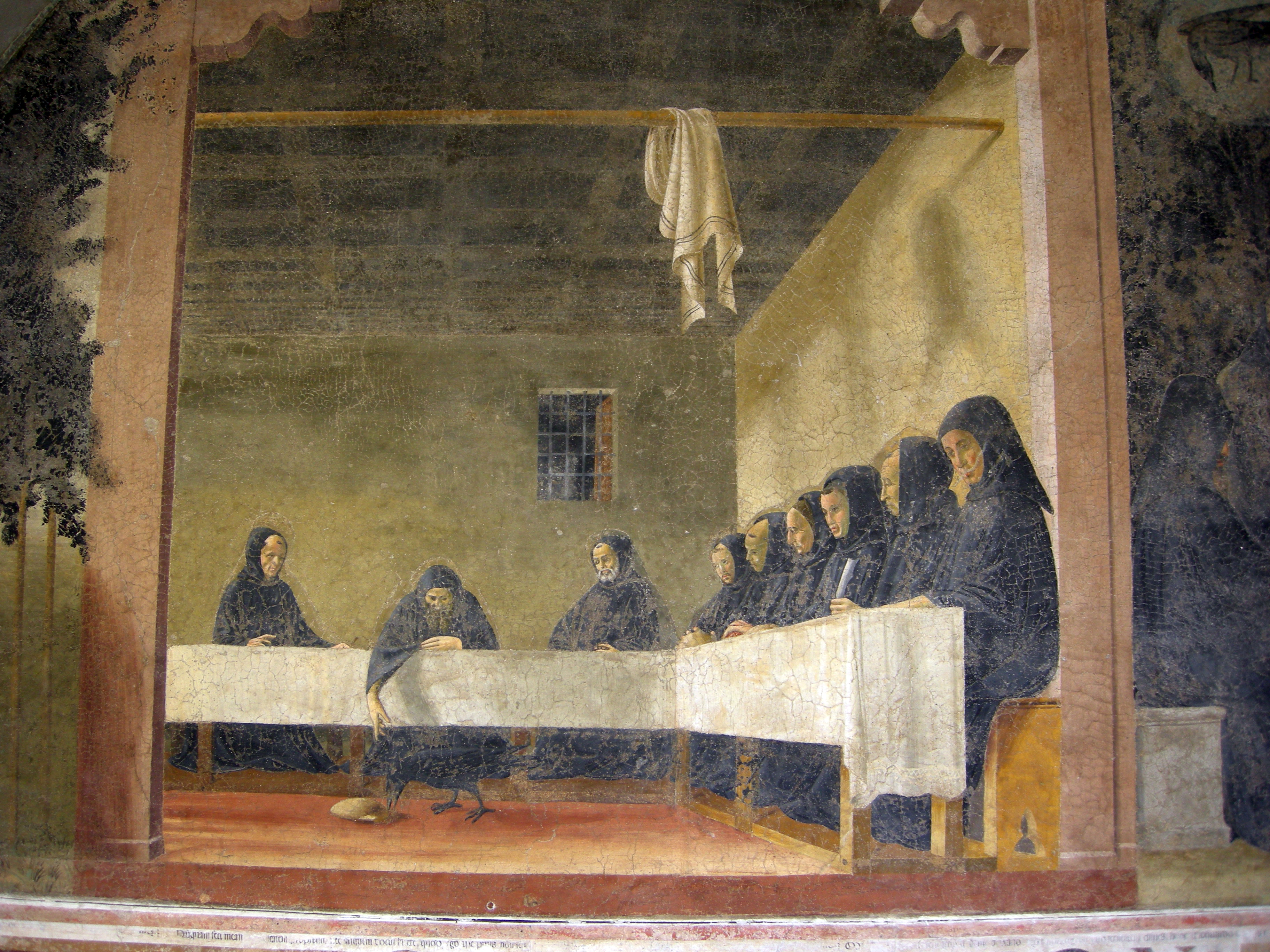 Chiostro degli aranci - Firenze